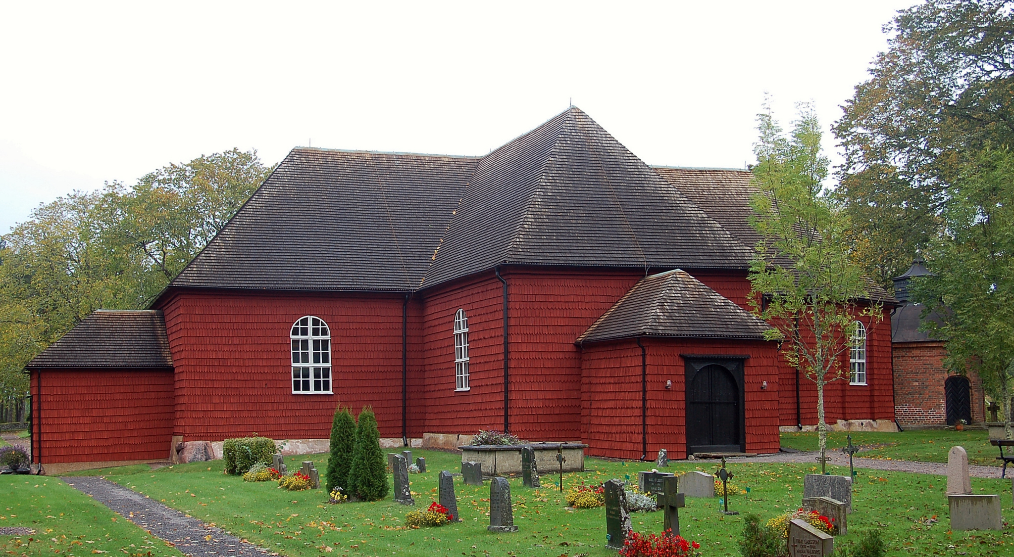 Visnums kyrka